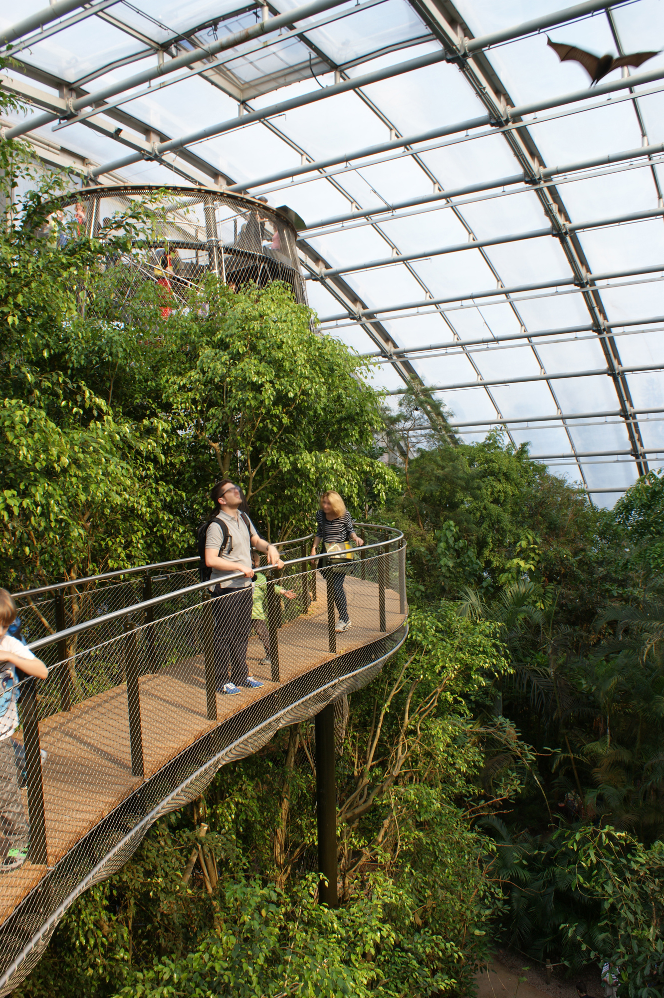 Baumkronenweg in der Masoala-Halle 2013 – Blick vom tieferen zum höheren Turm